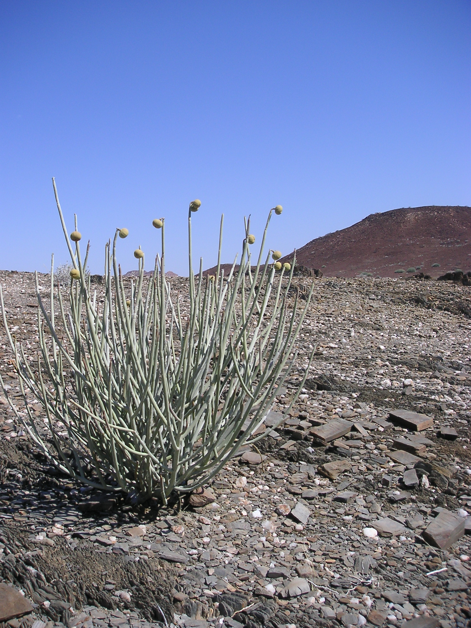 Euphorbia damarana (endemisch), Familie: Euphorbiaceae (Wolfsmilchgewächse)